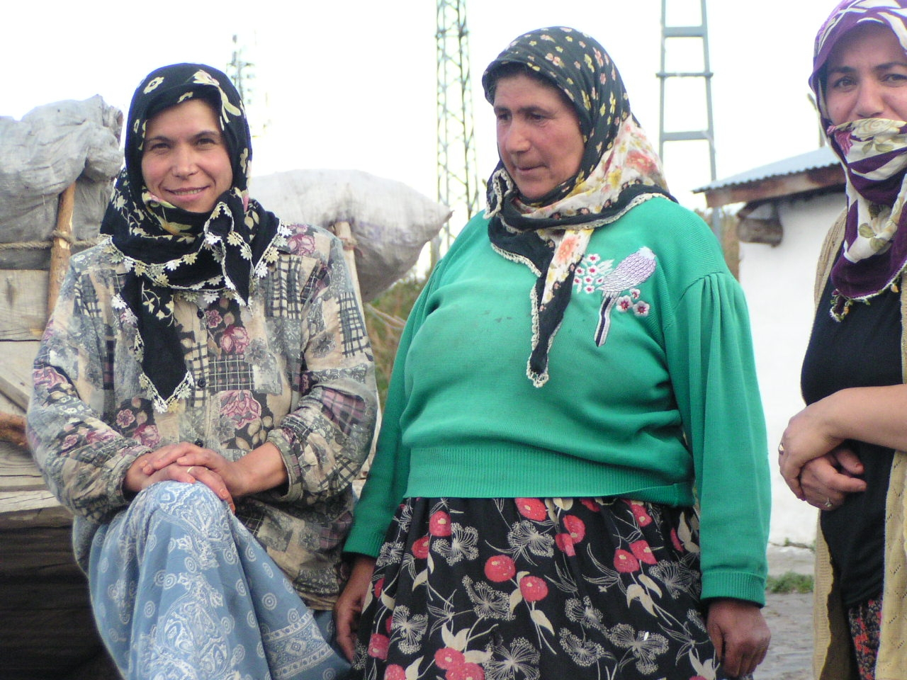 Türkische Kopftuchträgerinnen in der Nordosttürkei bei Kars.